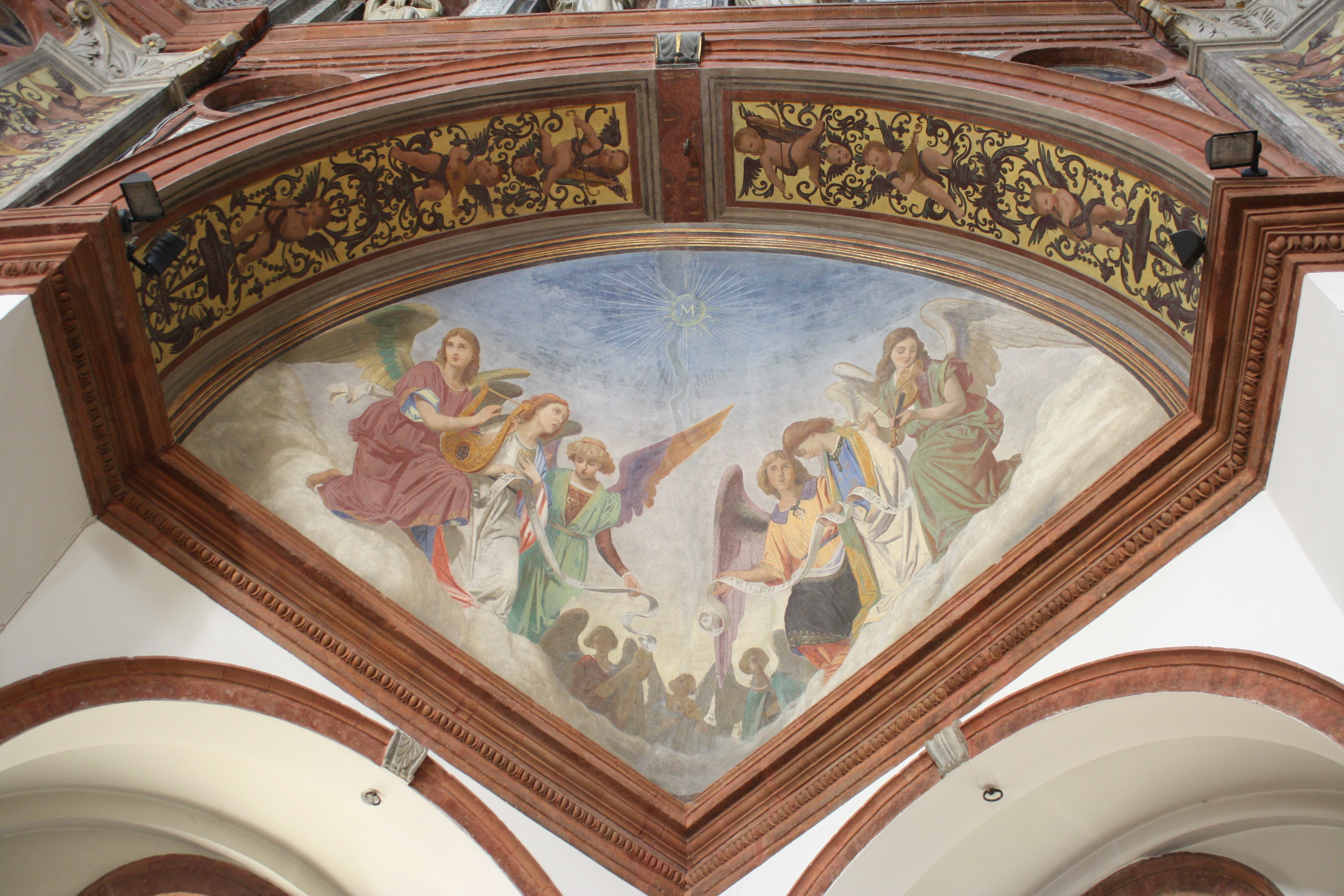 Affreschi nel Santuario di Santa Maria di Piazza a Busto Arsizio This is a photo of a monument which is part of cultural heritage of Italy.